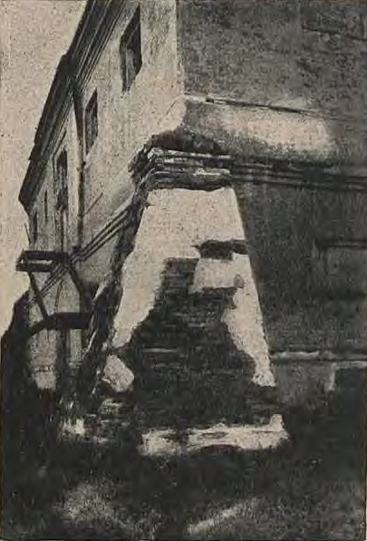 Беларуская (тарашкевіца): Рагачоў (Rahačoŭ). Замак